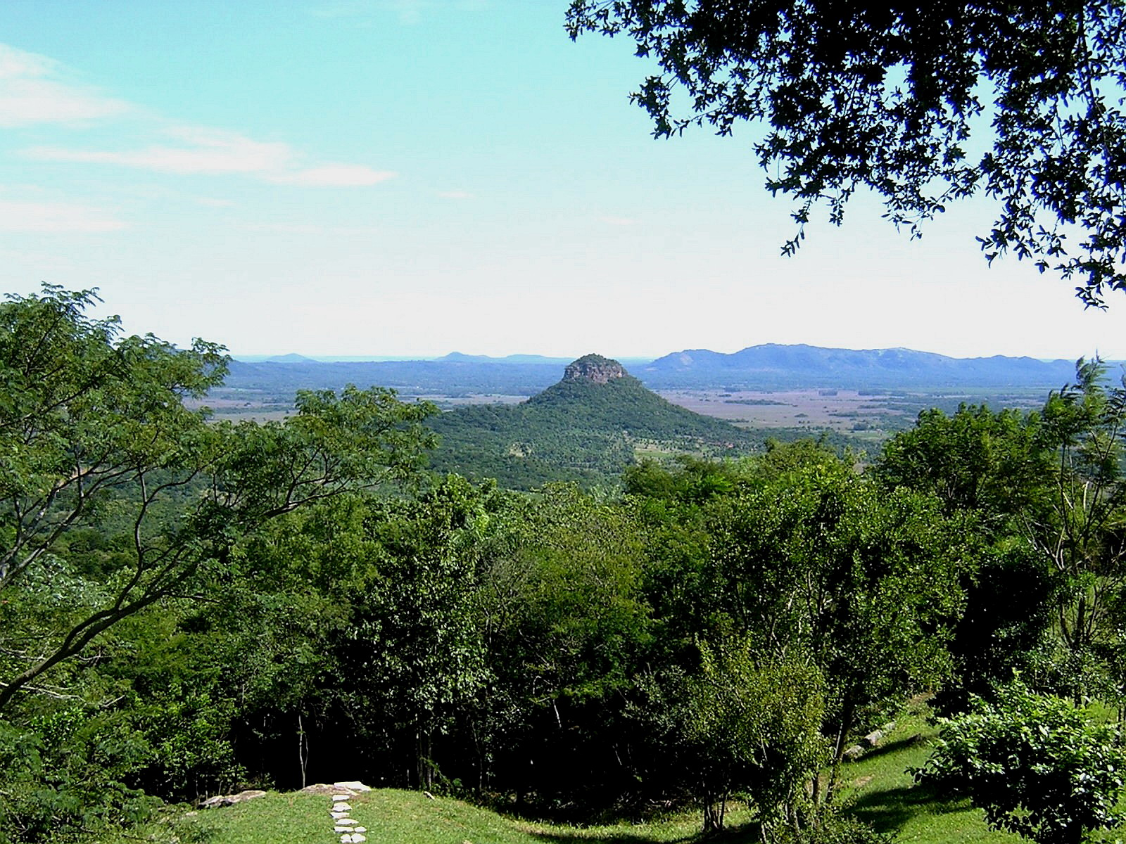 Cerro Mbatovi Paraguay